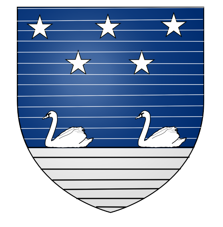 Coupé d'azur burelé et d'argent aux deux cygnes passants et aux cinq étoiles de même